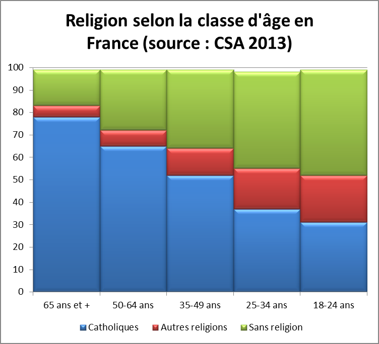 Selon l'étude du CSA publié en 2013